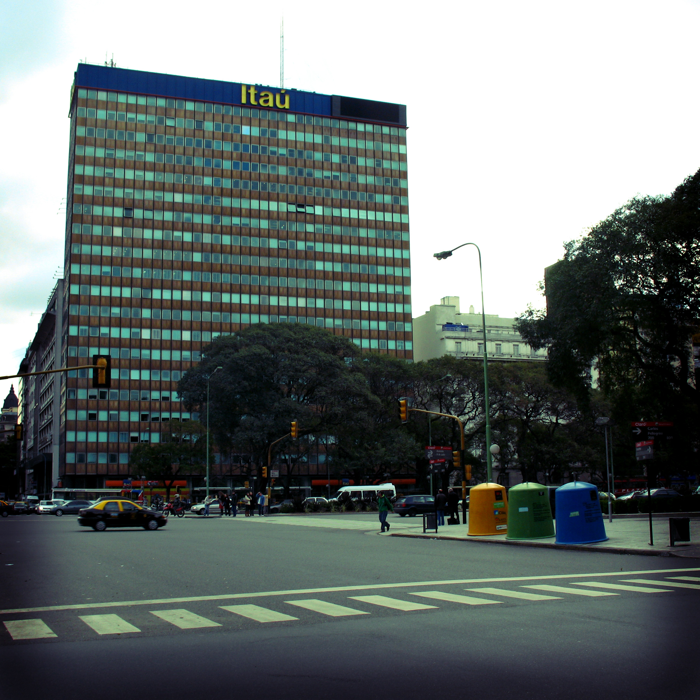 Torre Mirafiore o Mirafiori. Avenida 9 de Julio, intersección con calle Viamonte, Buenos Aires, Argentina.